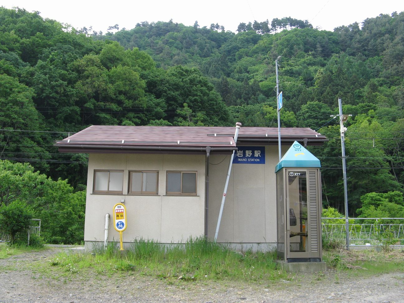 長野電鉄屋代線 岩野駅